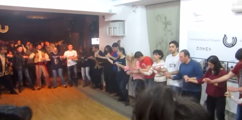 Թագավորի գյովնդ պարը «ՄԵՐ ՊԱՐԵՐԸ ԵՎ ՄԵՆՔ» ամենամսյա միջոցառման ժամանակ